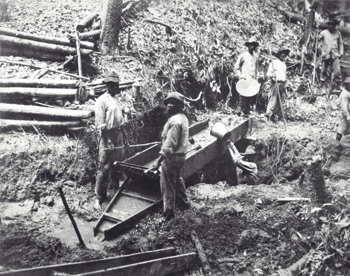 Foto. Goudwassers met een "Long Tom" op het terrein van de goudmijn "Placer L. & F. de Jong"